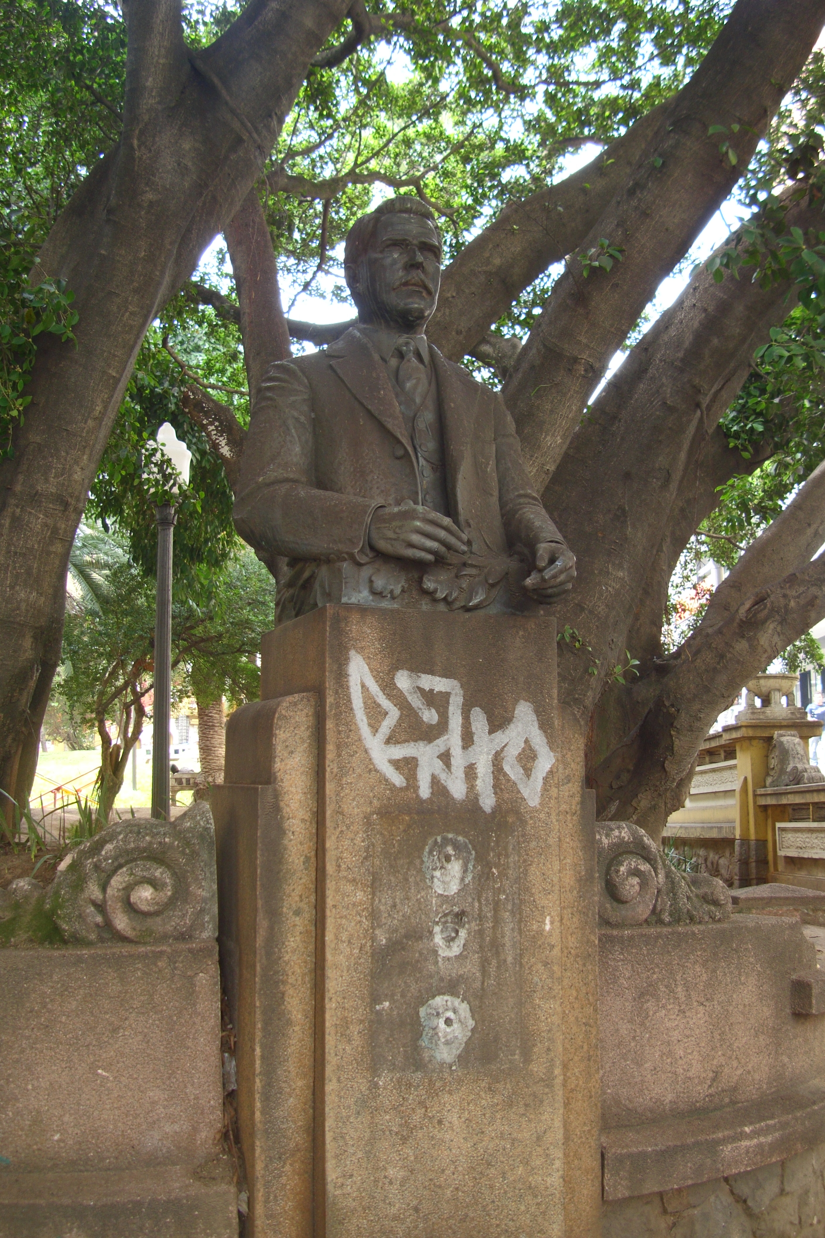 Busto de Otávio Rocha, na Praça Otávio Rocha, em Porto Alegre, Rio Grande do Sul, Brasil